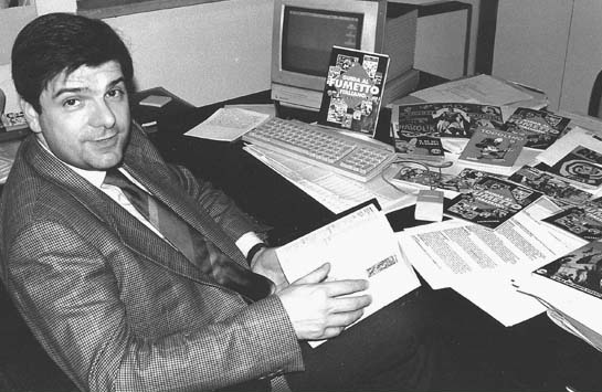 Gianni Bono, editore e storico, autore della Guida al Fumetto Italiano. Foto di Joe Zattere (Fumetti d'Italia)